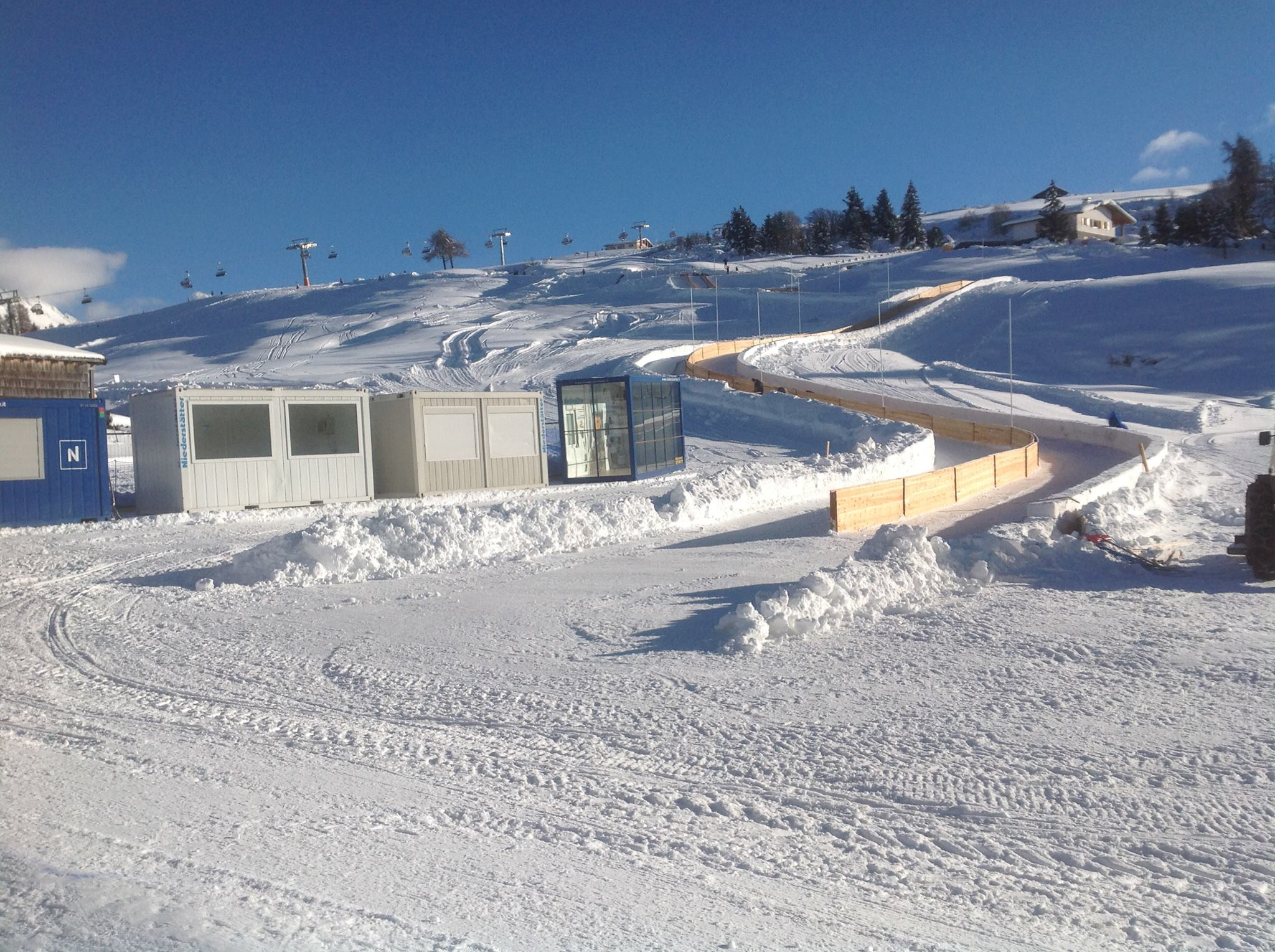 Rodelbahn Parallel-Worldcup